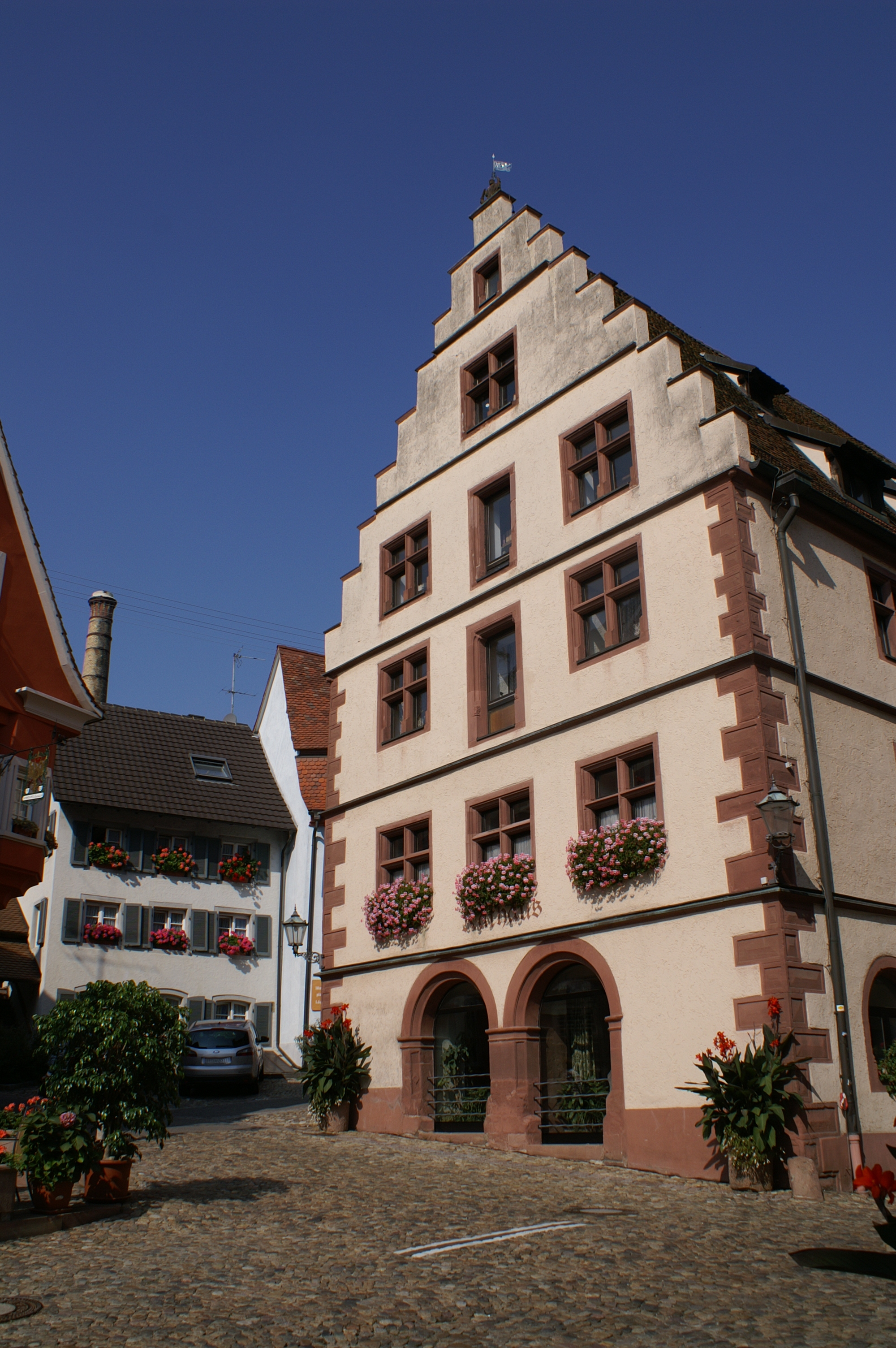 Rathaus in Endingen am Kaiserstuhl